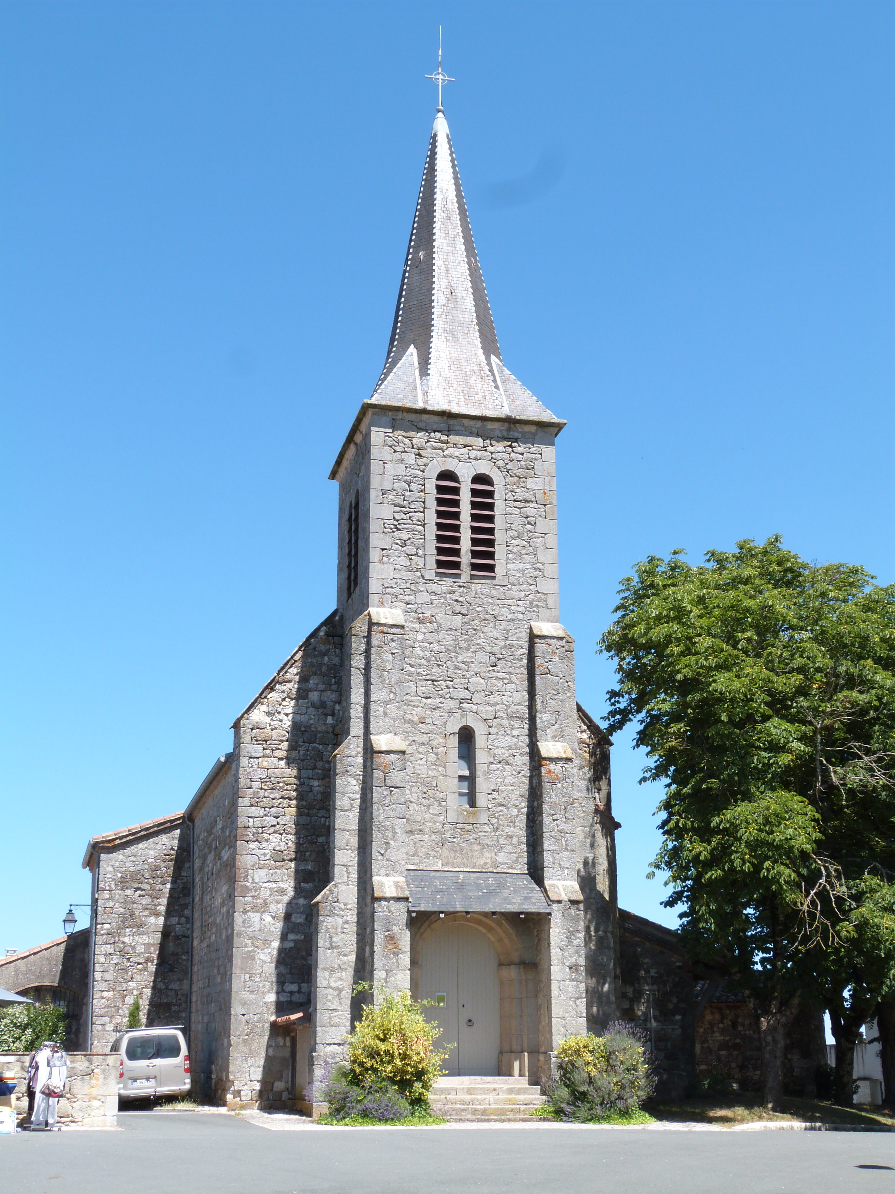 Eglise Saint-Eusèbe à Campagnac (Tarn)